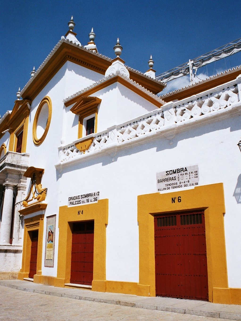 Stierkampfarena Sevilla, selbst fotografiert, Sept. 2004, GNU-FDL